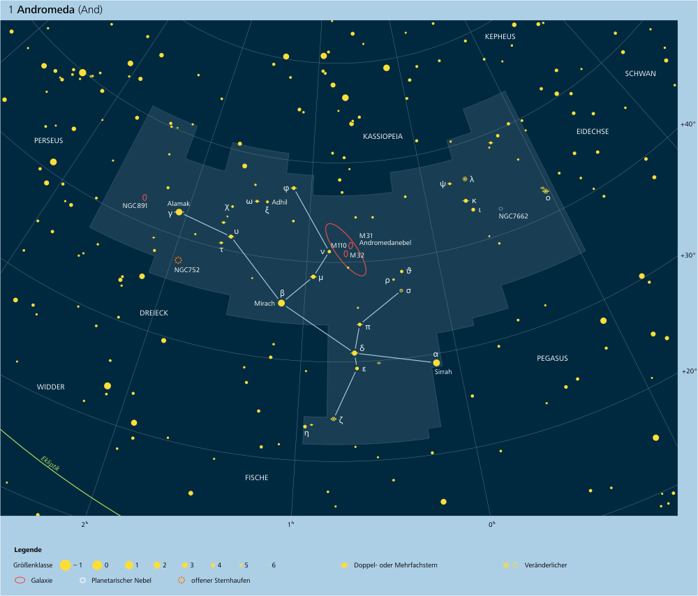 Karte des Sternbildes »Andromeda«. Quellen: selbst erstellt, Grundlagen: »Bright Star Catalogue, 5. Auflage«, »NGC 2000.0«-Katalog und weitere Kataloge. Sonstiges: Es wurden nur Sterne bis zur Größenklasse 5,5 aufgenommen. Alle eingezeichneten Objekte beziehen sich auf J2000.0.